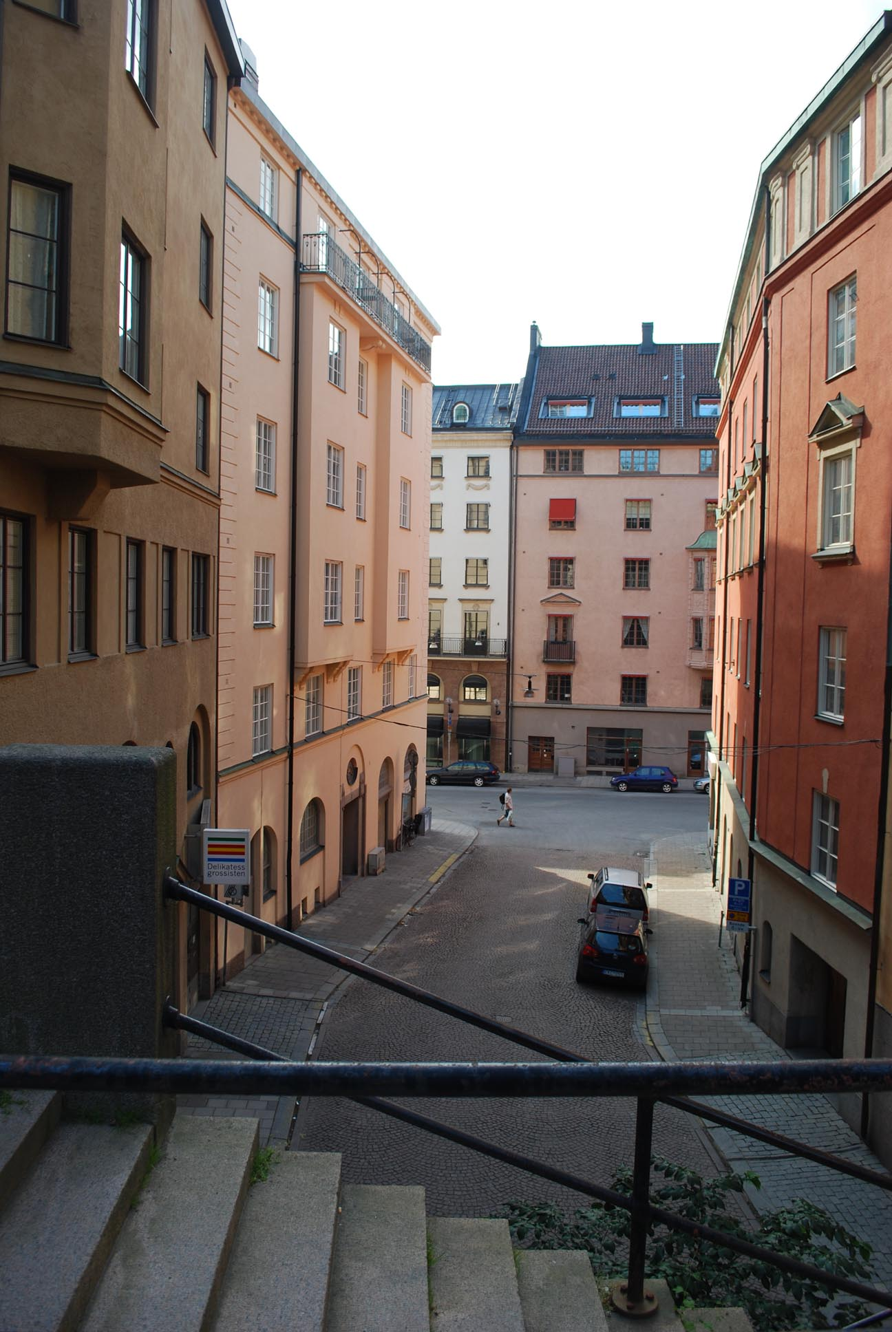 Lodgatan mot Rådmansgatan sedd från Eriksbergsgatan i Stockholm